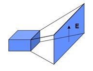 Bocina Piramidal Lisa.Categoría:antena